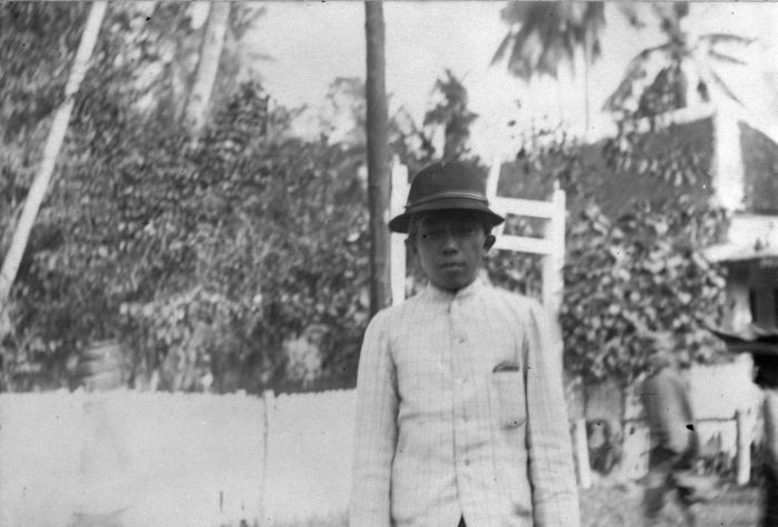 Foto. Regent Raden Toemenggoeng Ario Kromo Djojo Adinegoro, Modjokerto, Oost-Java